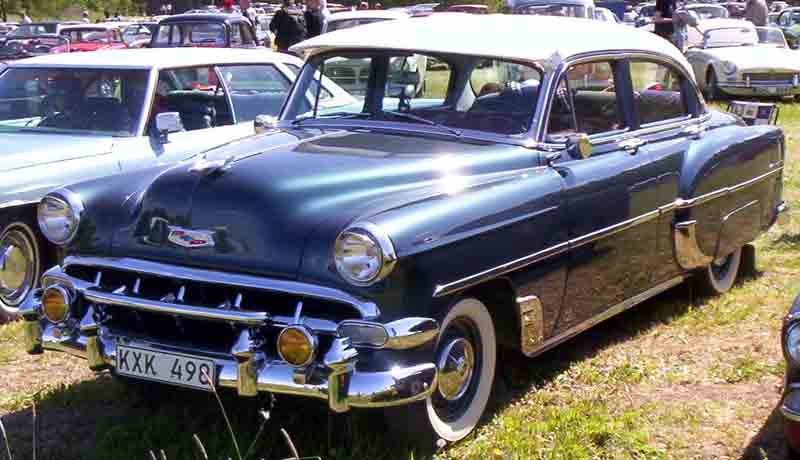 1954 Chevrolet Two-Ten Deluxe Series, Model 2103 4-Door Sedan